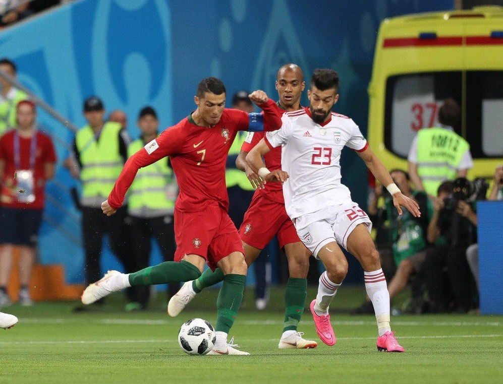 نیمه نخست بازی تیم‌های فوتبال ایران و پرتغال در جام جهانی ۲۰۱۸